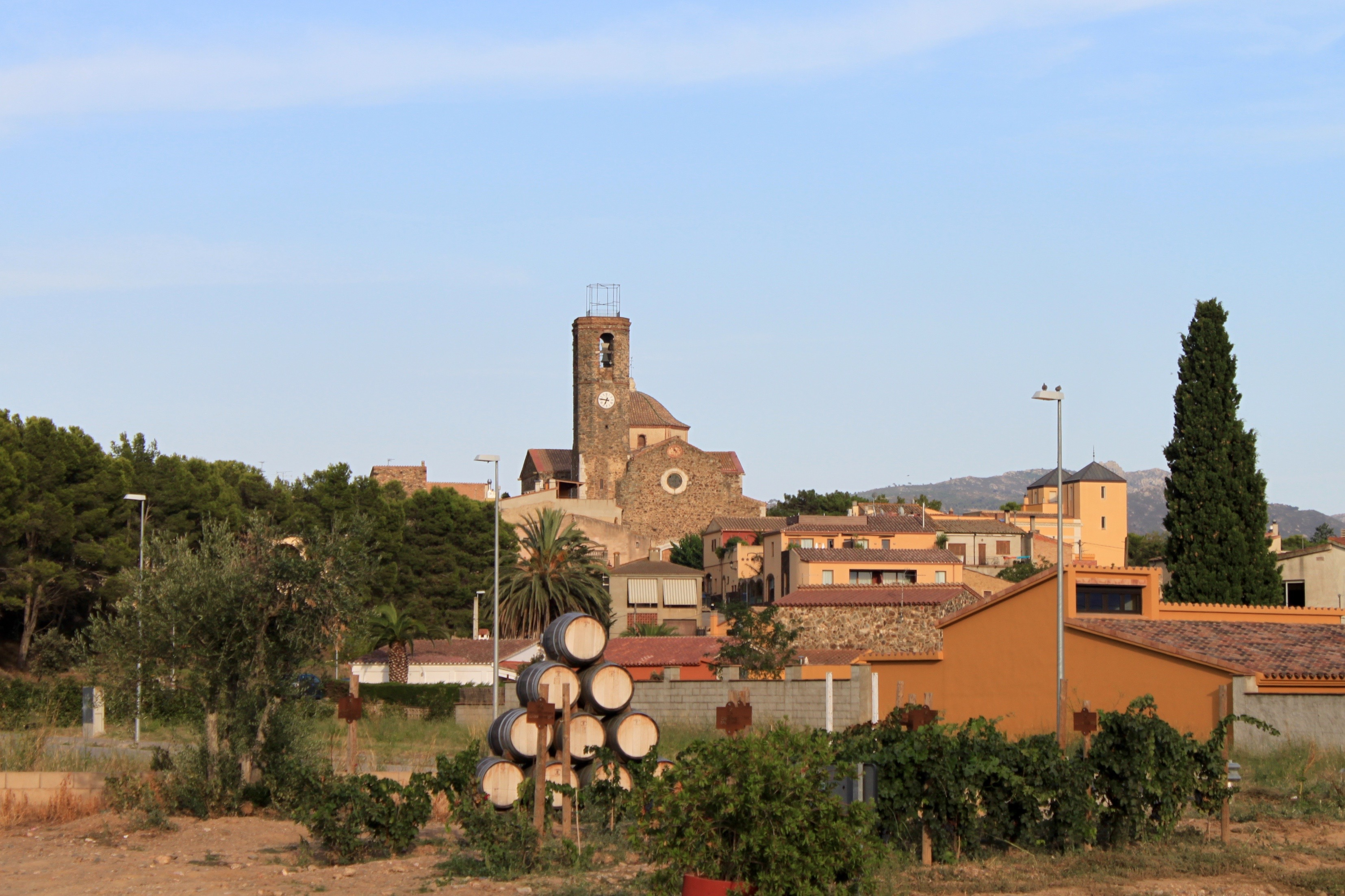 Garriguella (Gerona)